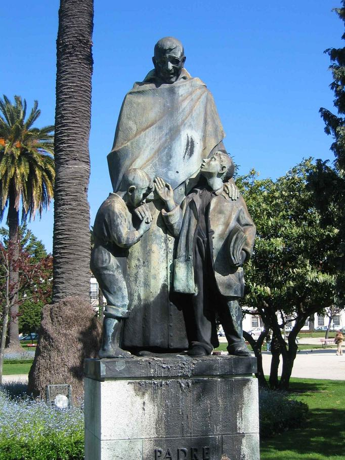 Padre Américo (1959/61) - Henrique Moreira - Porto - Portugal